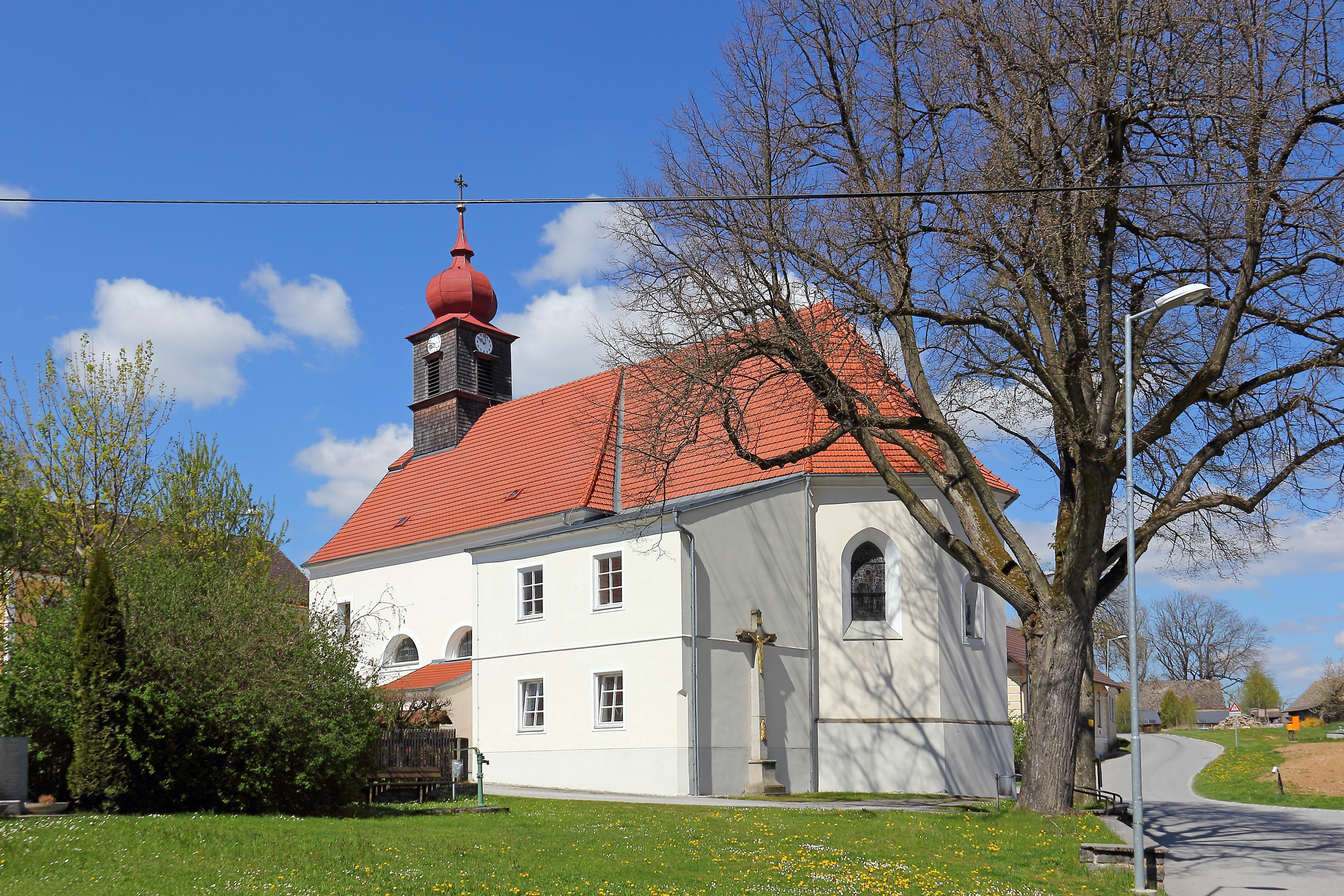 Die Pfarrkirche hl. Florian am westlichen Ende des Längsangers von Buchbach ist eine im Kern gotische, im dritten Viertel des 17. Jahrhunderts barockisierte, schlichte Saalkirche mit einem Dachreiter von 1902. Neben der Kirche stehen zwei Sommerlinden die 1961 zum Naturdenkmal erklärt wurden. This media shows the natural monument in Lower Austria with the ID WT-043.